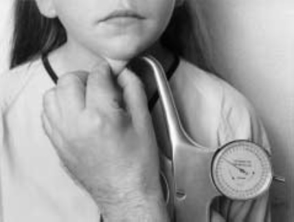 Método de determinación del espesor del plieque adiposo submandibular